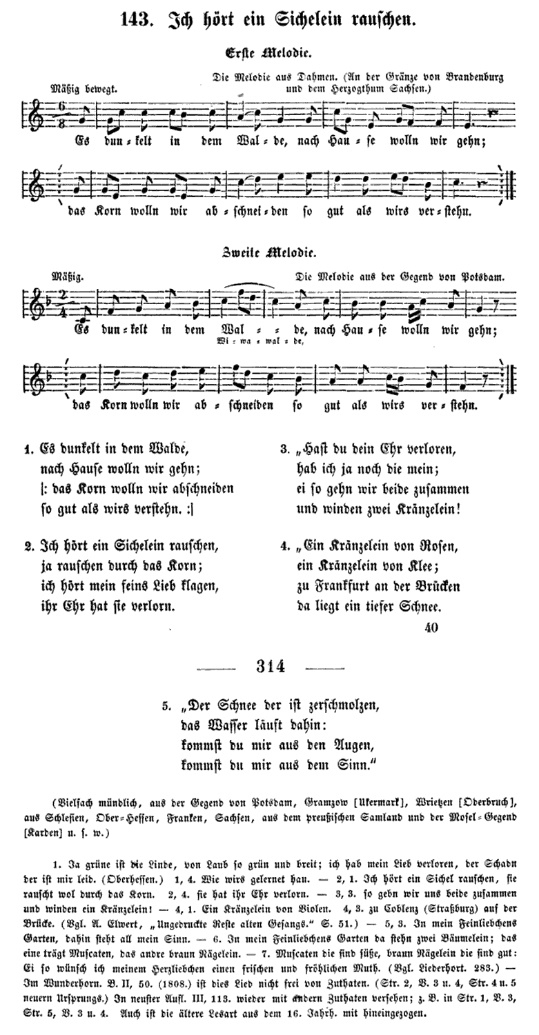 Ich hört' ein Sichelein rauschen (Es dunkelt in dem Walde): Text (trad.), Melodie (trad.)